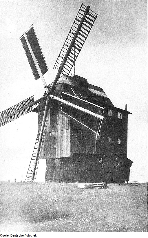 Original image description from the Deutsche Fotothek Leutersdorf-Hetzwalde. Hetzemühle, aus: Mitteilungen des sächs. Heimatschutzes. Eine vergehende Windmühlen-Landschaft in der südlichen Oberlausitz, 1924